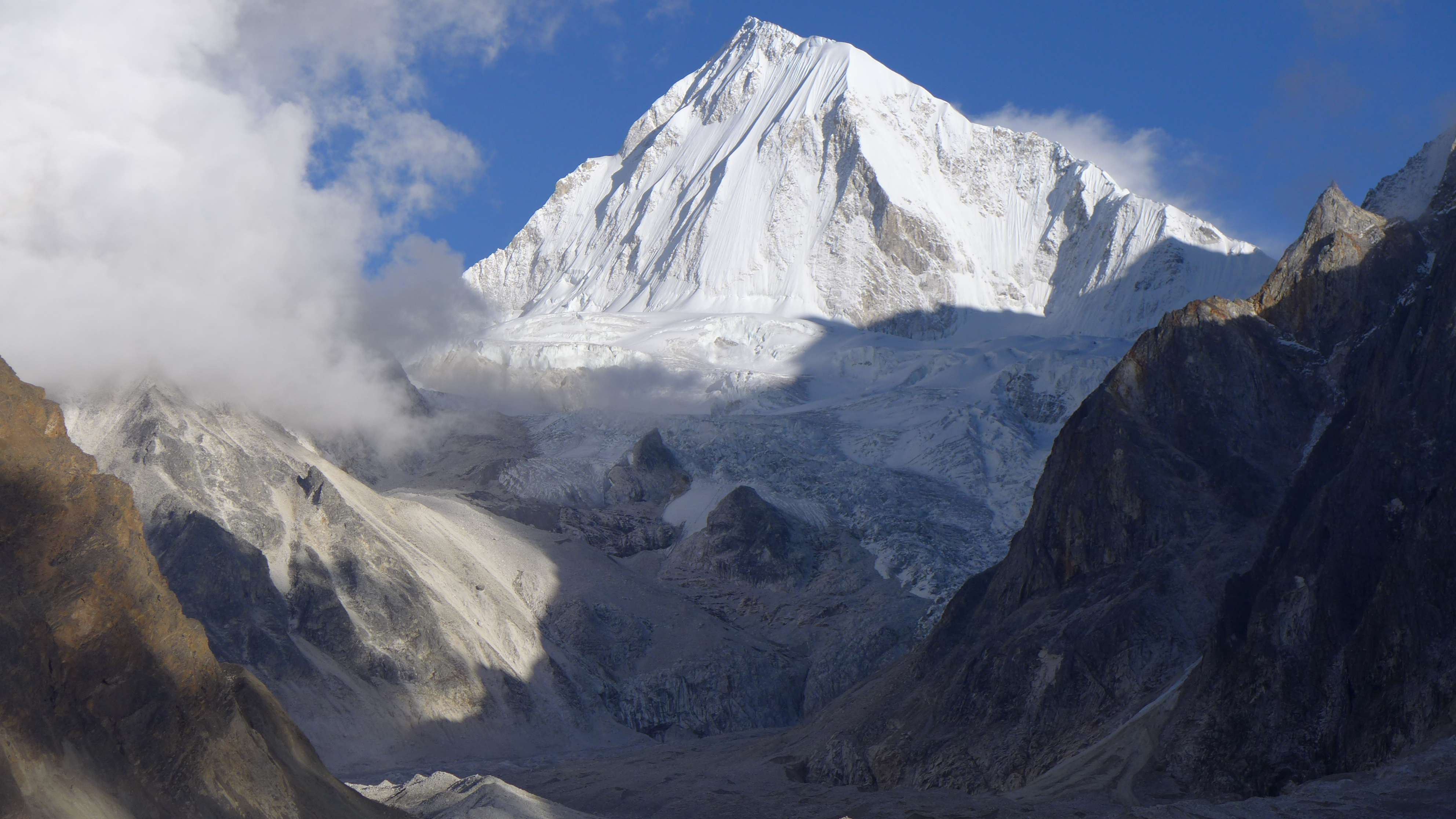 Nemjung Gipfel 7140 Meter